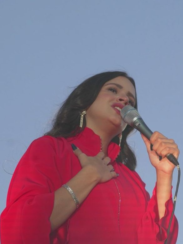 La cantaora barcelonesa Rosalía y el guitarrista Raül Refree, en equilibrado y armónico tándem musical, ofrecieron ayer, domingo 23 de julio, un concierto lleno de emoción y sentimiento que entusiasmó al público. El auditorio al aire libre del Parque de la Cuña Verde de O’Donnell, en el distrito de Moratalaz, tuvo el aforo completo. También se registró un lleno total en la pantalla de apoyo que se instaló con 300 plazas en el mismo parque para quienes no pudieron acceder al recinto.